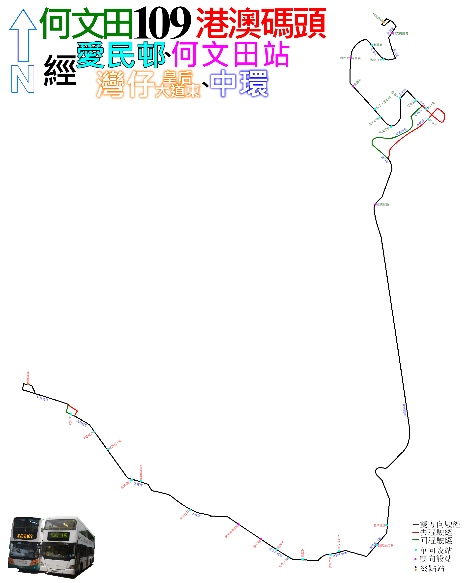 中文（香港）: 過海隧巴109路的走線圖